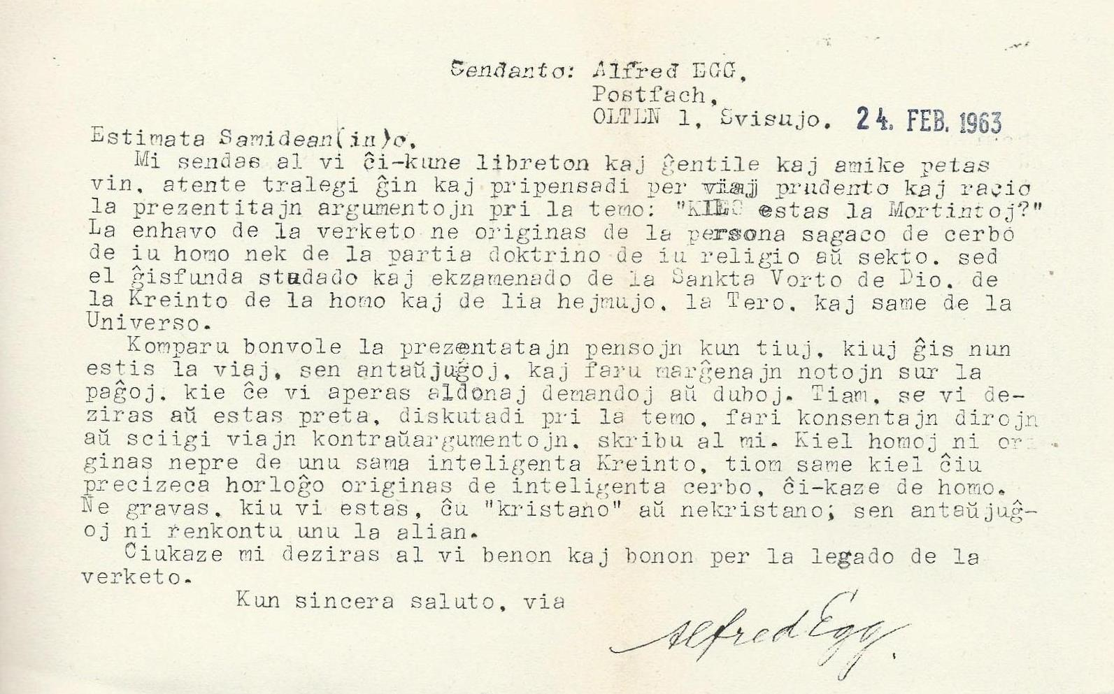 Letereto de Alfred Egg, 1963/Arhxivajxo FelixArchief